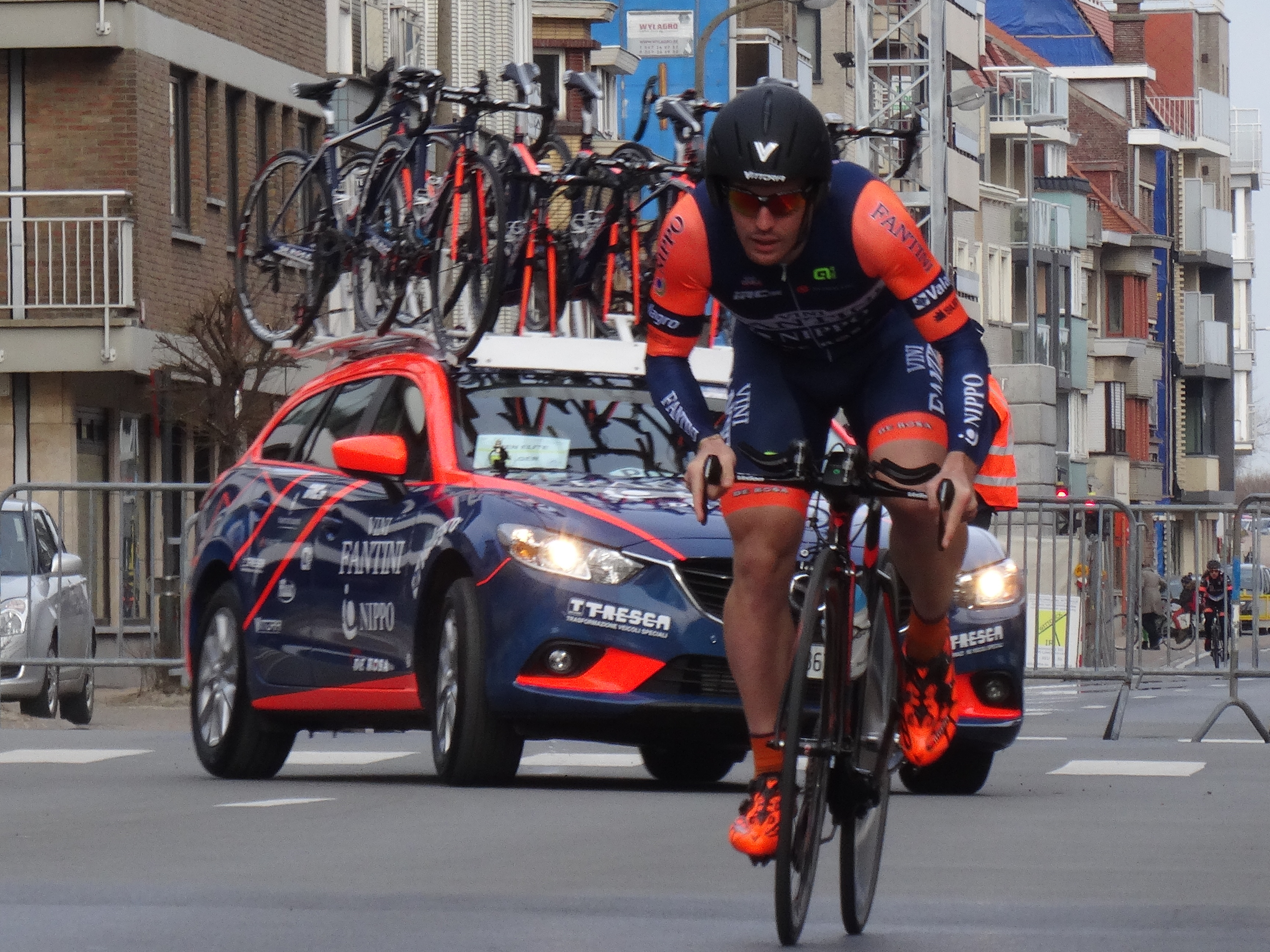 Prologue de Driedaagse van West-Vlaanderen 2015... Depicted person: Mattia Pozzo Depicted team: Nippo-Vini Fantini